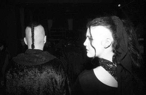 Dark Waver, bzw. Post Punker im Tanzcafe LiBella, Altenmarkt an der Alz, Februar 1997